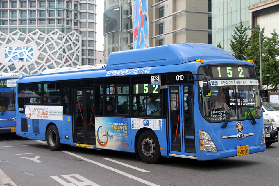 동아운수 소속 뉴 슈퍼 에어로시티 초저상